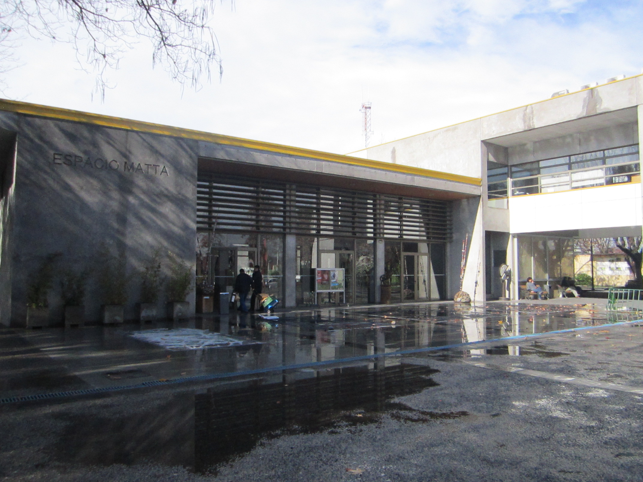 Vista hacia la fachada del Centro Cultural Espacio Matta, ubicado a un costado de la Municipalidad de La Granja en Santiago de Chile.